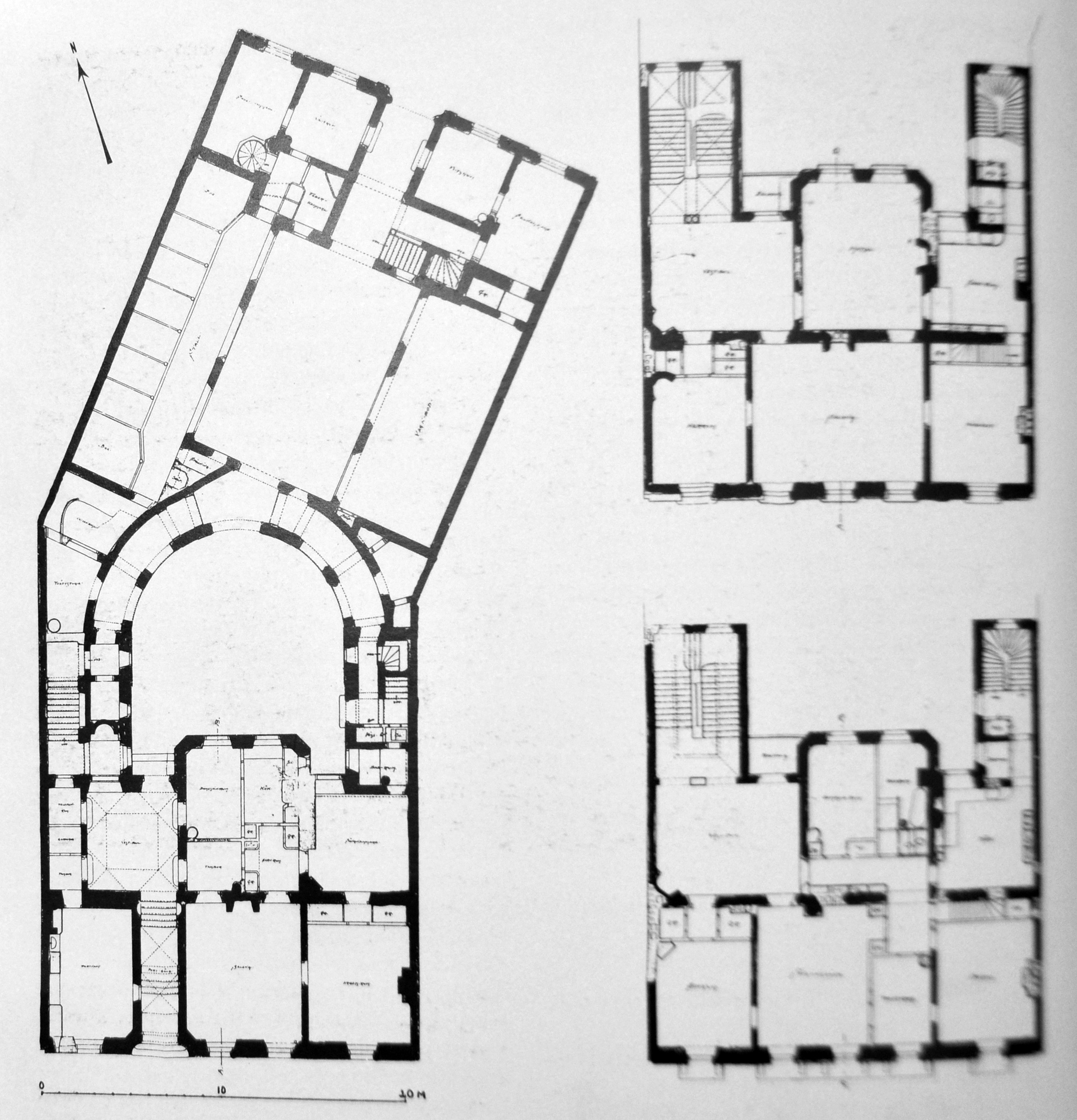 von Rosenska palatset. Planritning